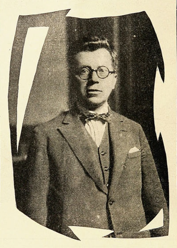 Rafael Florencio Fontecilla Riquelme (Mulchén, Chile, 7 de agosto de 1889 - 10 de mayo de 1976) fue un abogado, profesor, jurista y juez chileno. Fue Presidente de la Corte Suprema de Chile.